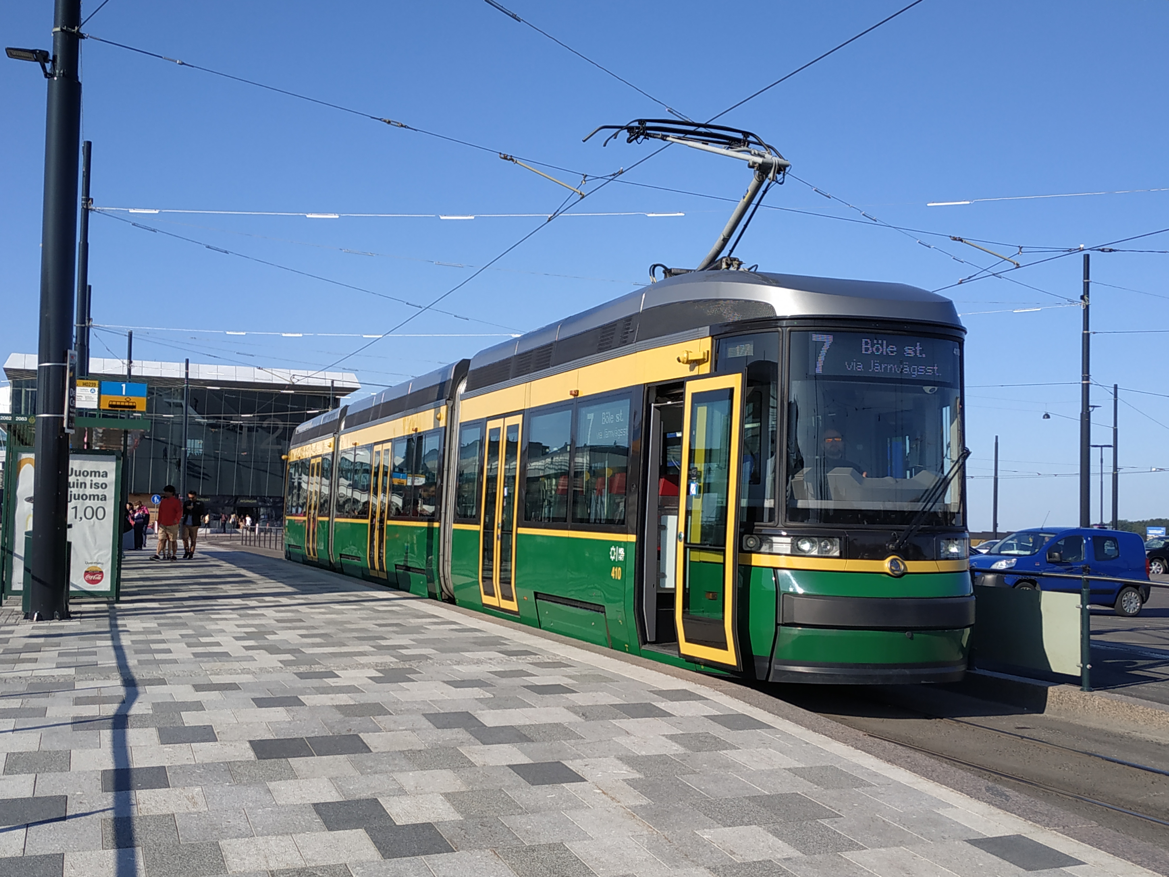 Tramway d'Helsinki au terminal voyageur du port d'Helsinki